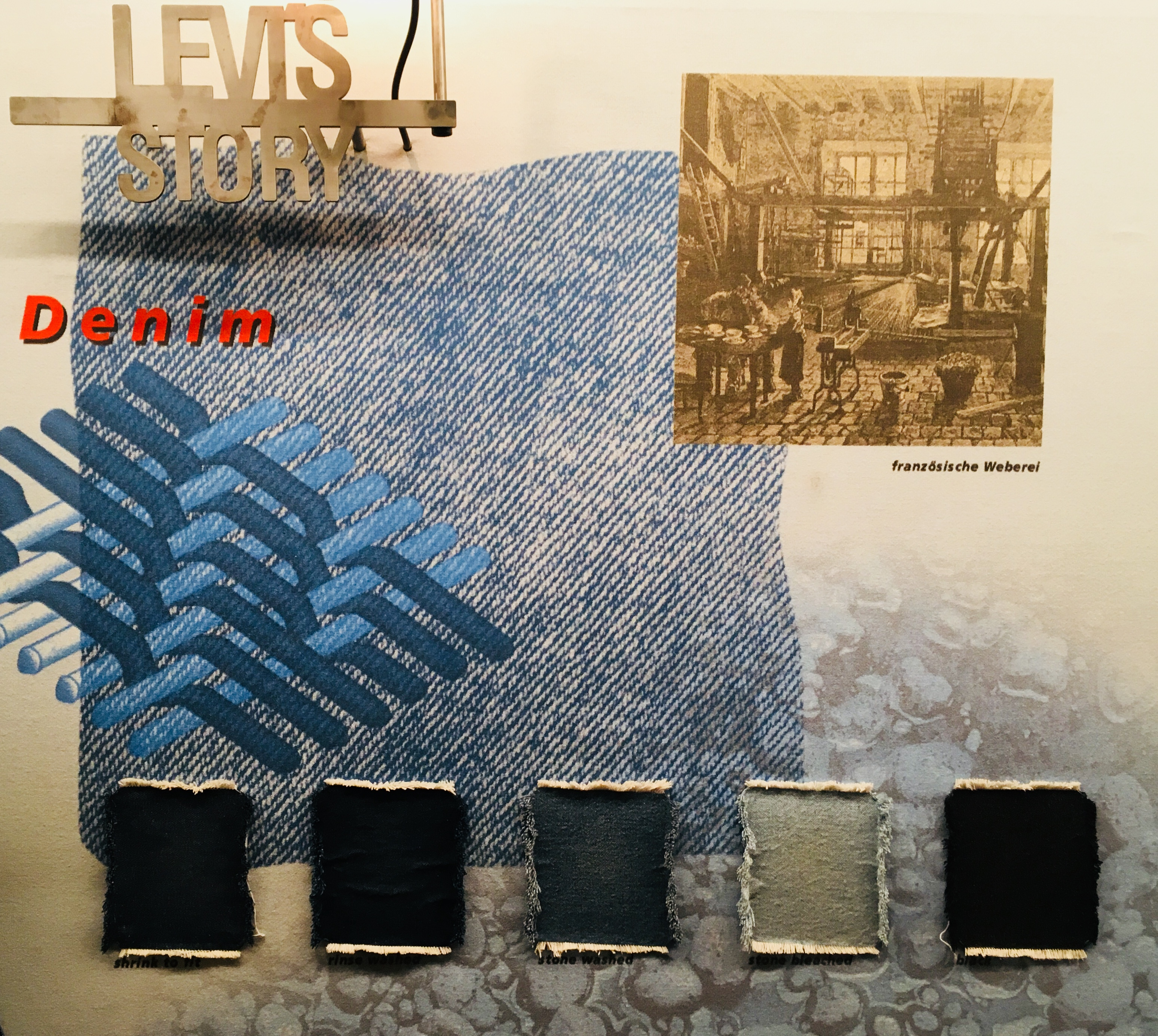 Webmuster, Stoffteile mit verschiedenen Waschungen, Bild einer Weberei